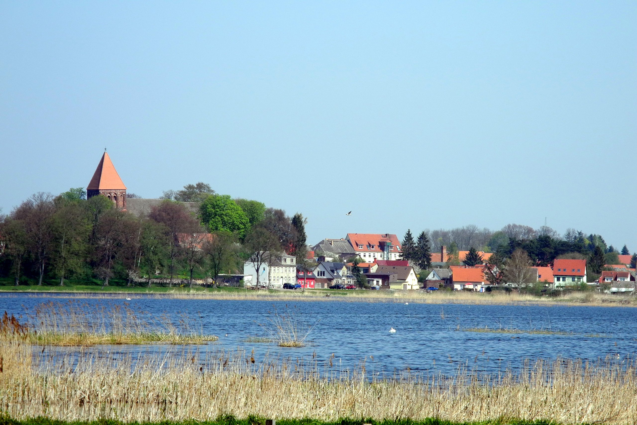 Richtenberger See - Lake of Richtenberg - Mit Blick auf Richtenberg